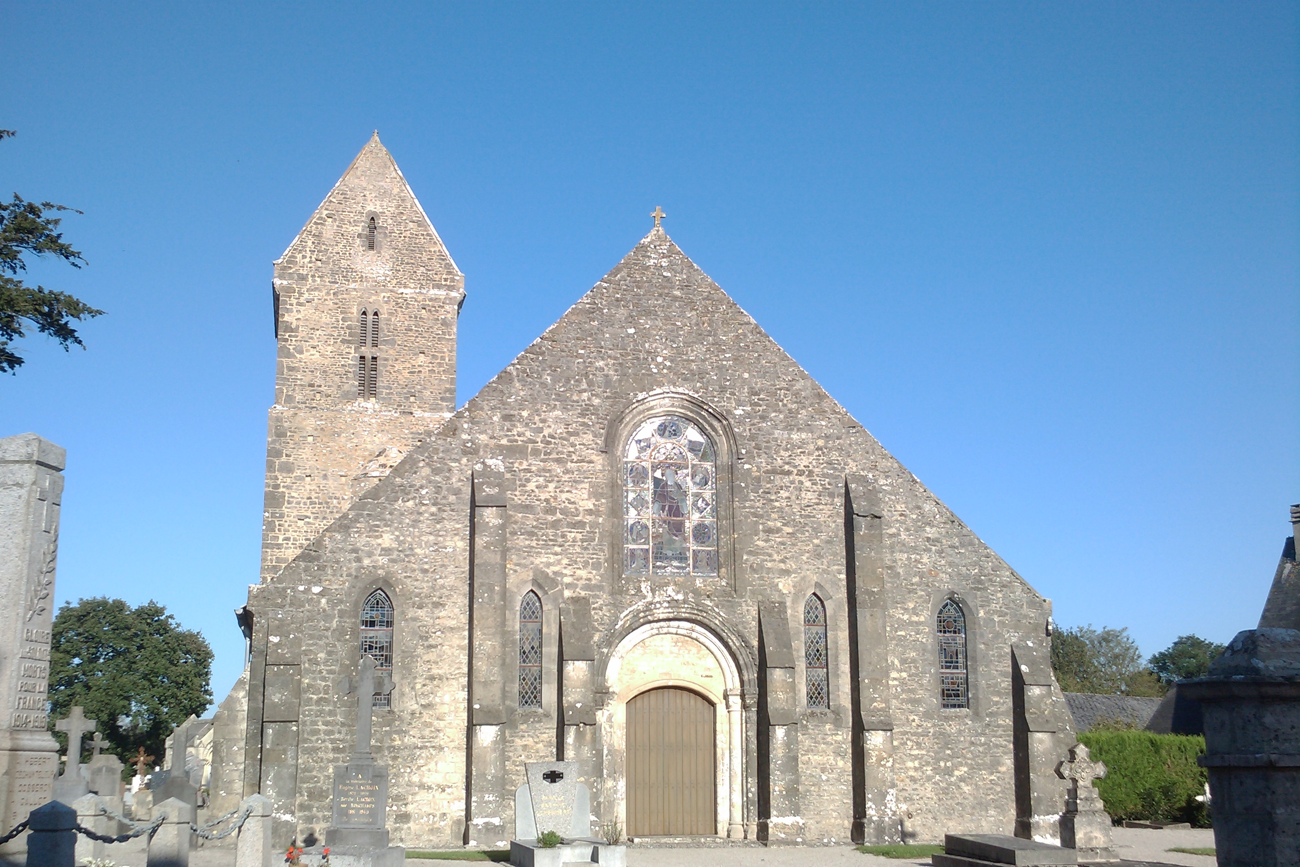 Église Sainte-Colombe-en-Cotentin, ancien nom de Chef-du-Pont .